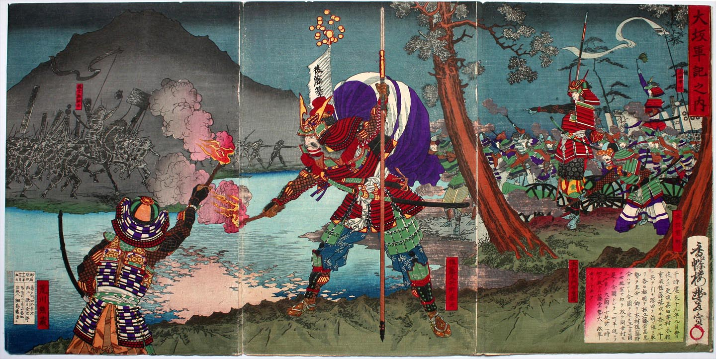 『大坂軍記之内』（1883）, 後藤又兵衛 真田幸村